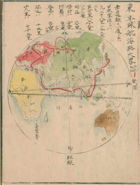 文久遣欧使節行程『欧西行紀』 高島祐啓 1867年